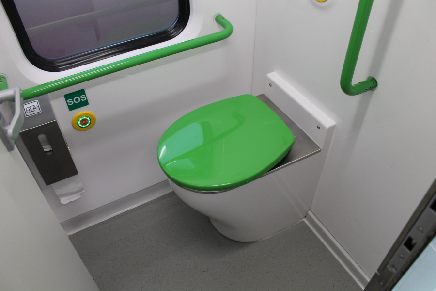 Toaleta w piętrowym wagonie środkowym Pesa Sundeck 416B-017.